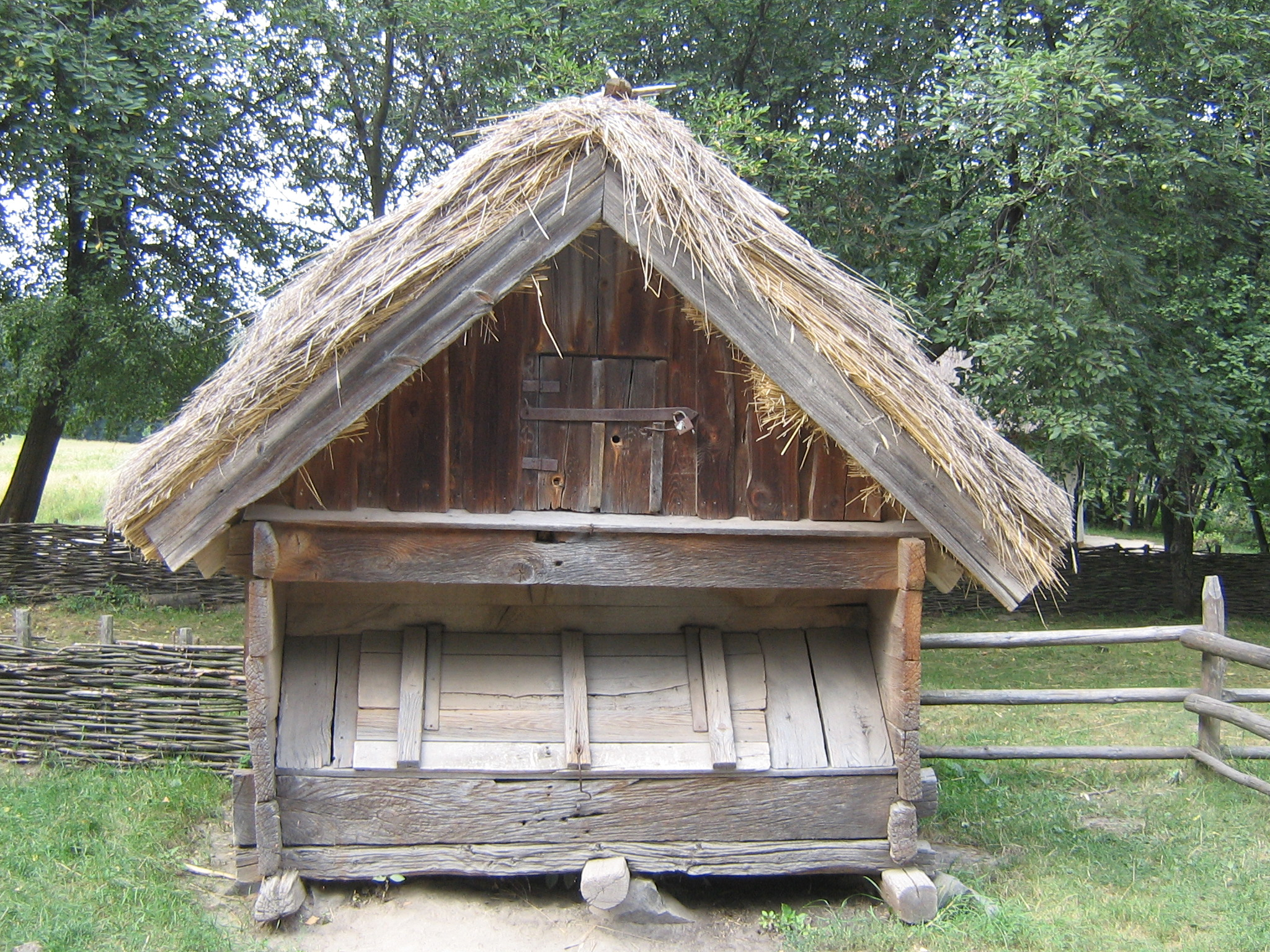 Саж с.Яснозір'я.